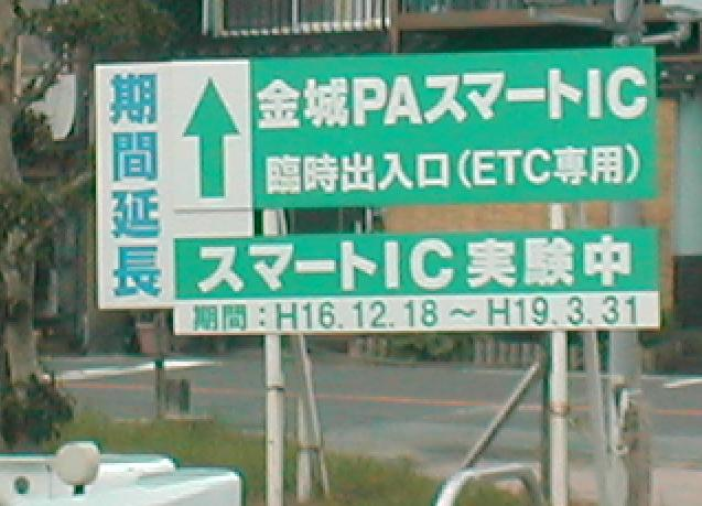 浜田自動車道金城PA ETC社会実験の標識案内。